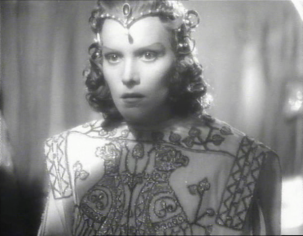 Screenshot del film La corona di ferro (1941) di Alessandro Blasetti.